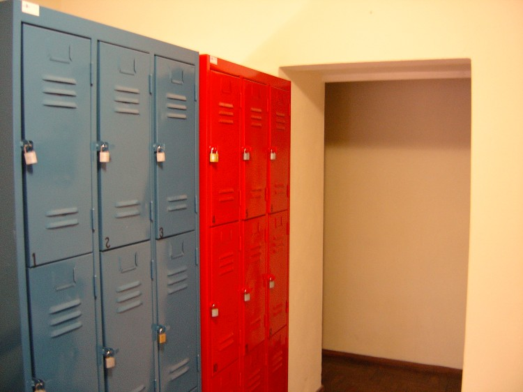 LOKERS